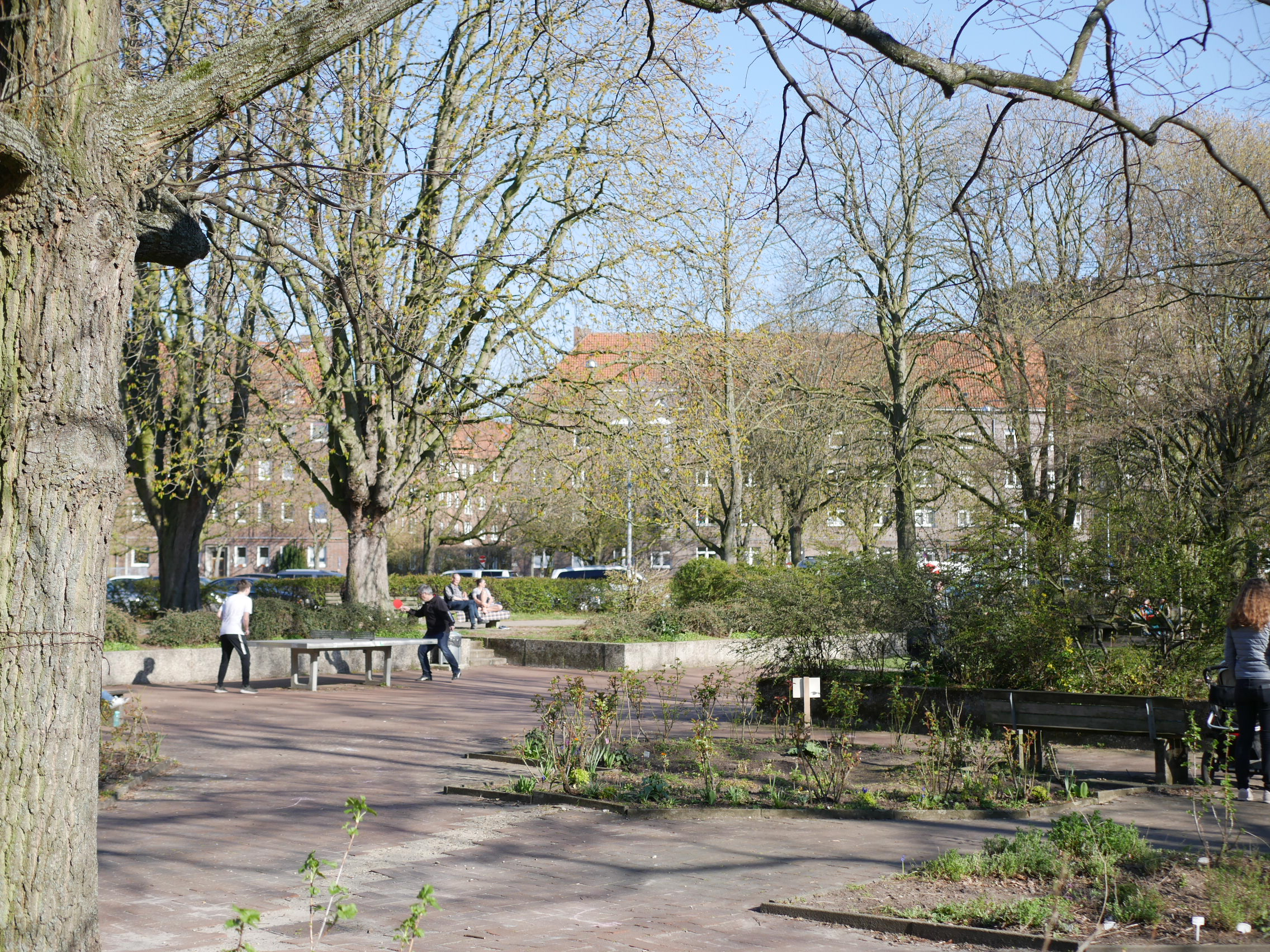 Bertha-von-Suttner-Platz, Hannover, Niedersachsen, Deutschland